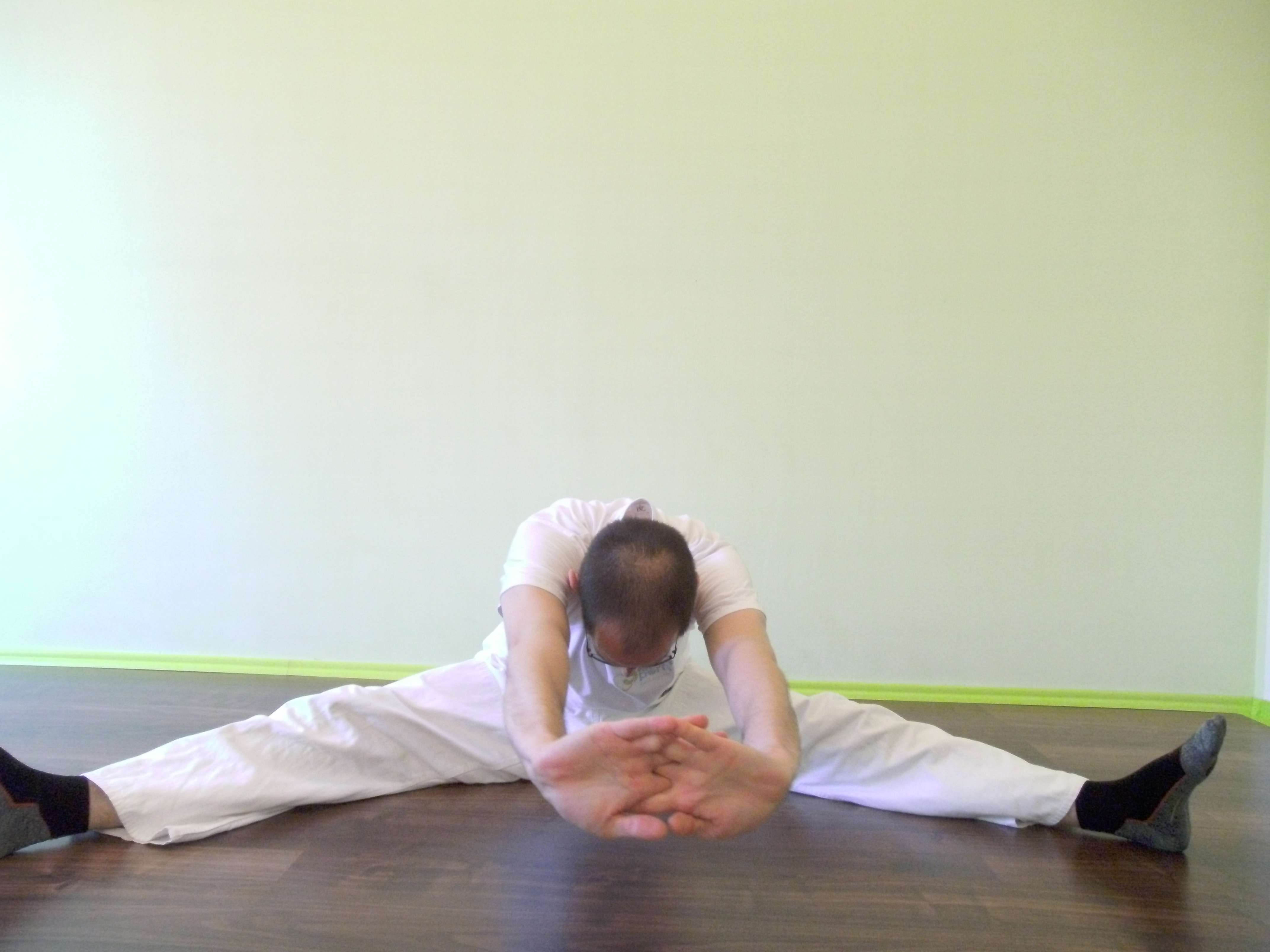 Makko Ho Übung für Gallenblasen- und Lebermeridian 2. Übung